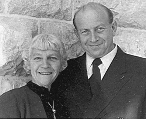 תמונה שצולמה על ידי הזל גרינוולד בין השנים 1943 – 1959